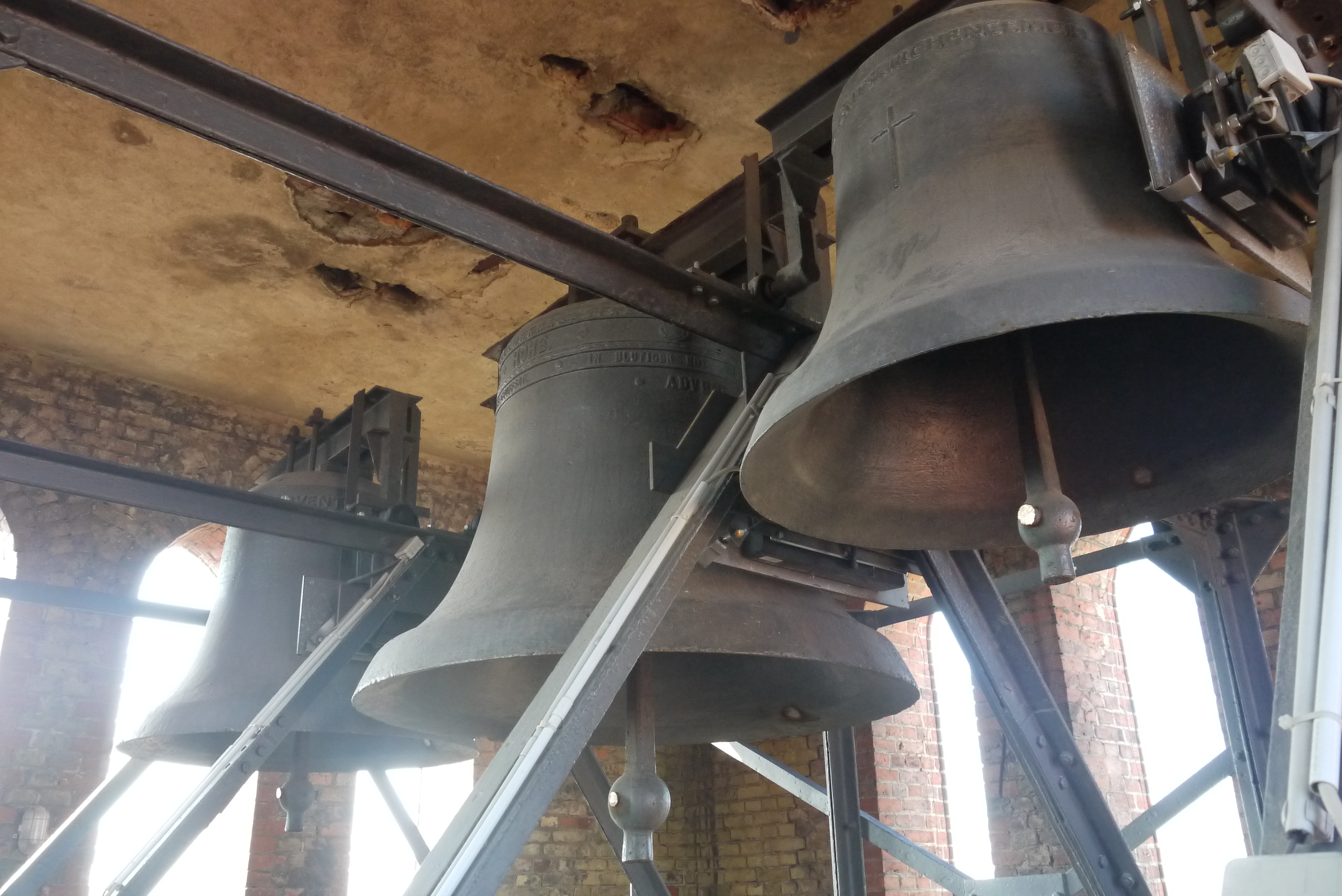 Die Glocken der evangelischen Adventkirche in Berlin-Prenzlauer Berg.